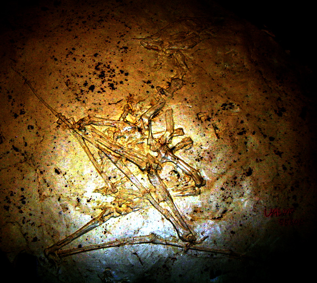 Sinopterus dongi